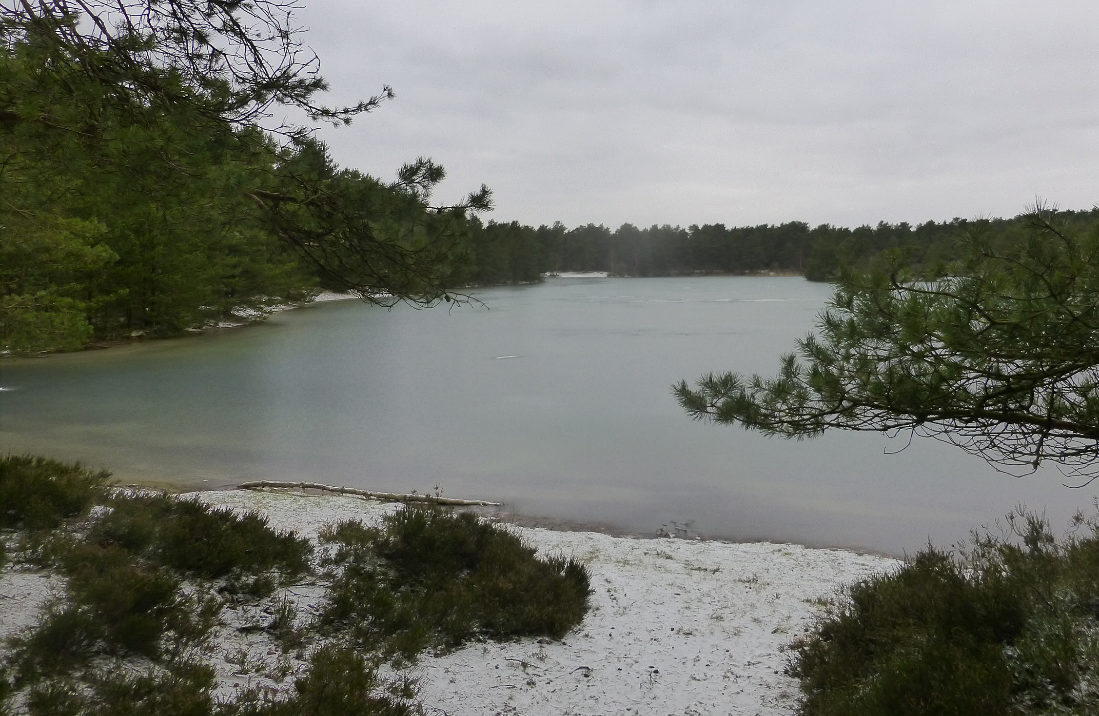 Schousbyes Sø set fra øst i januar 13